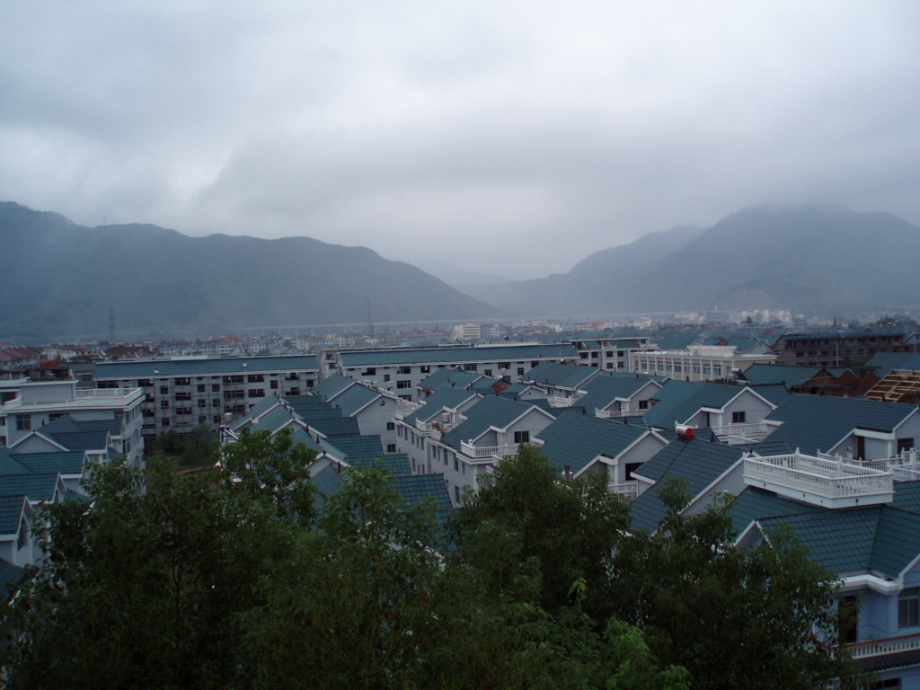 在镇政府大楼上俯瞰